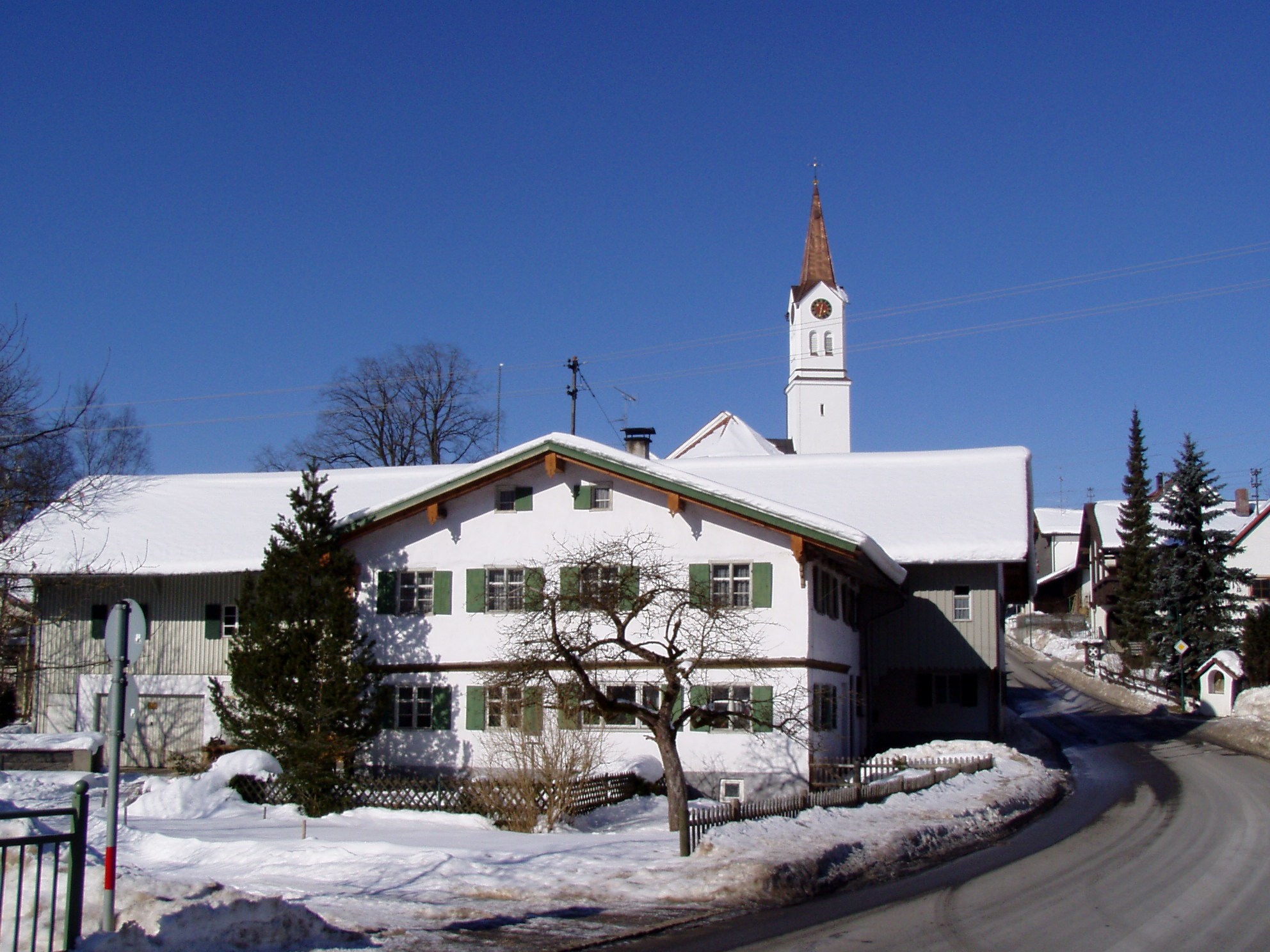 Hauptstr. 6, Görisried